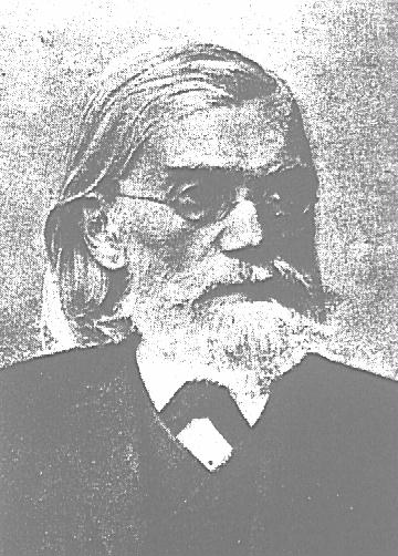 Jakob Heinrich Lützel Quelle: Museum Bröhl-Iggelheim Fotograf/Zeichner: unbekannt Datum: vor 1899